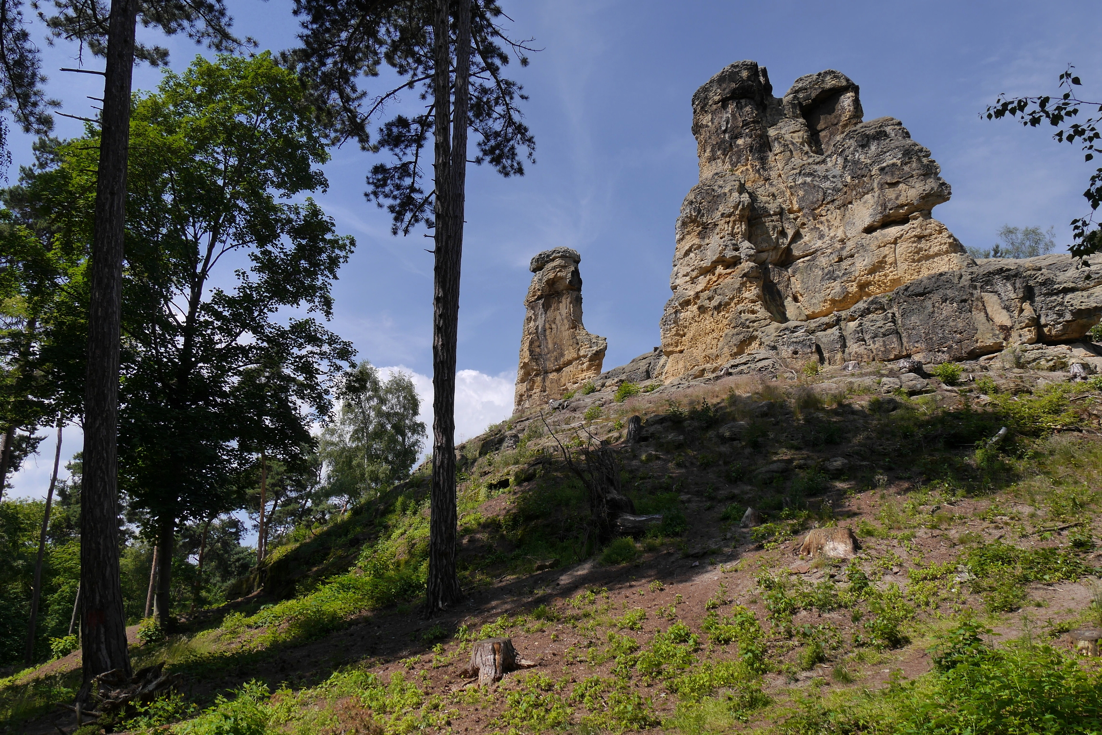 Teil der Klusfelsen am südlichen Stadtrand von Halberstadt